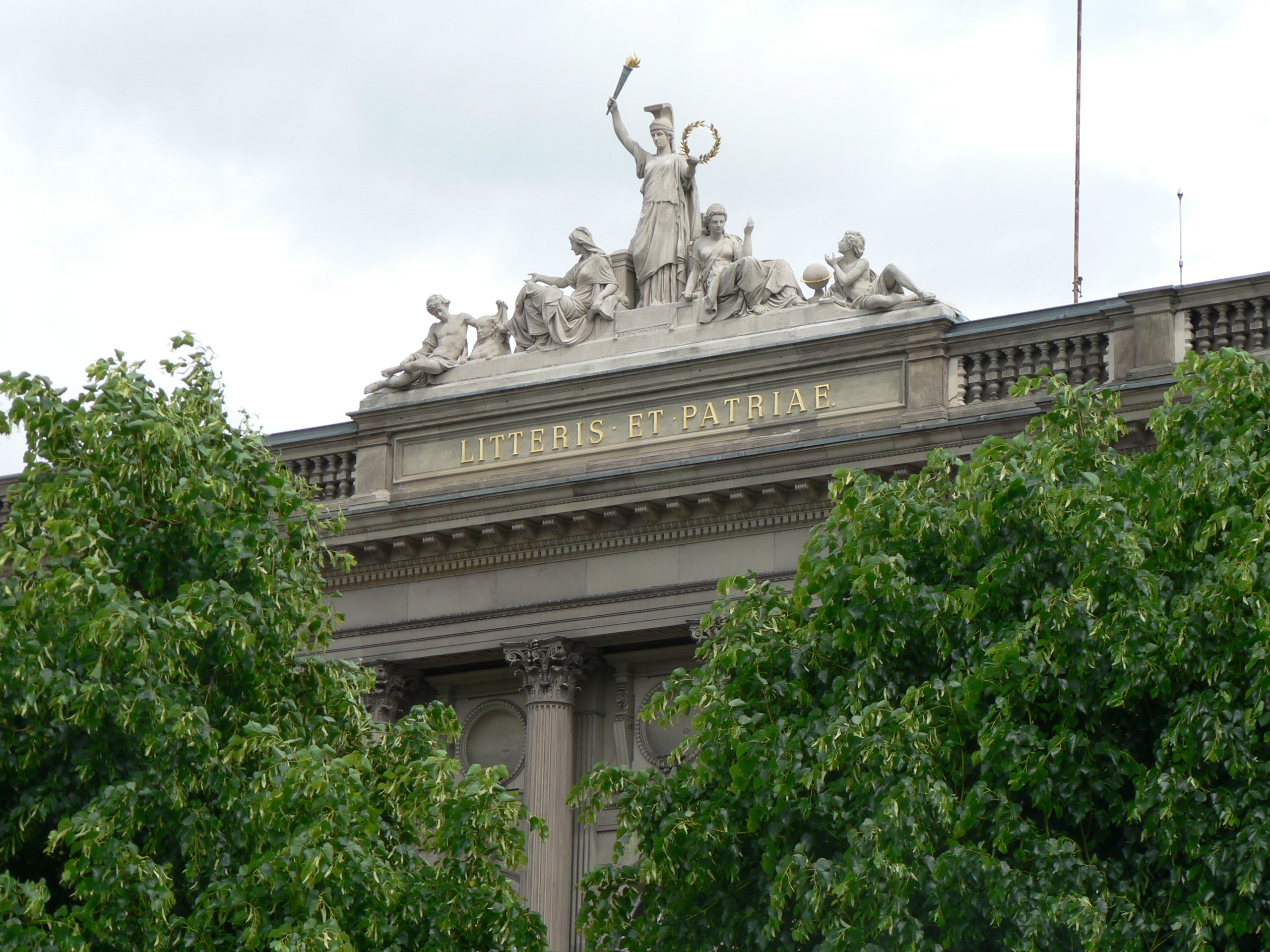 Průčelí budovy univerzity ve Štrasburgu